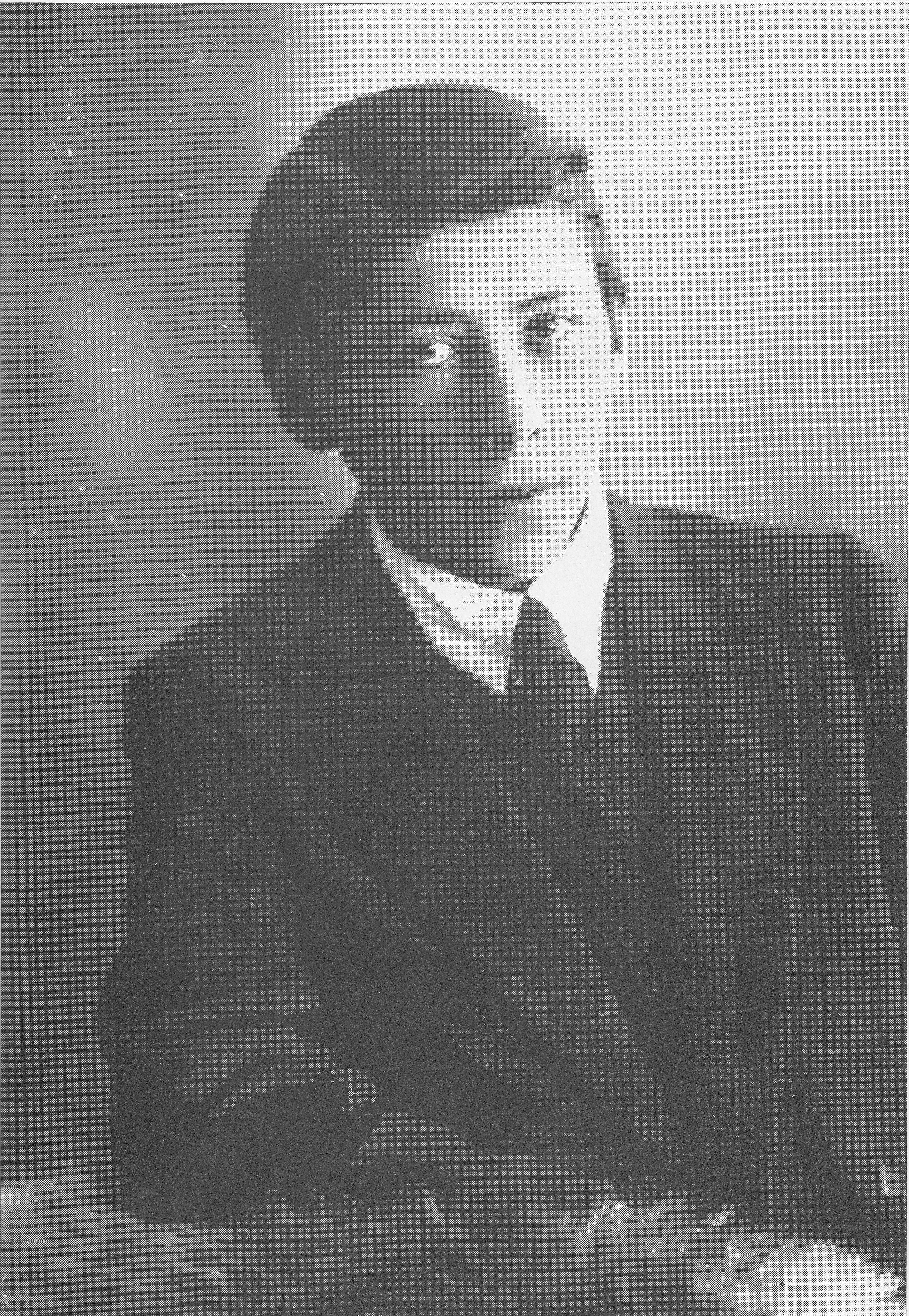 Rafael Paasio vuonna 1918